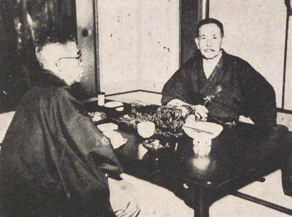 立憲政友会・鈴木喜三郎総裁と望月圭介